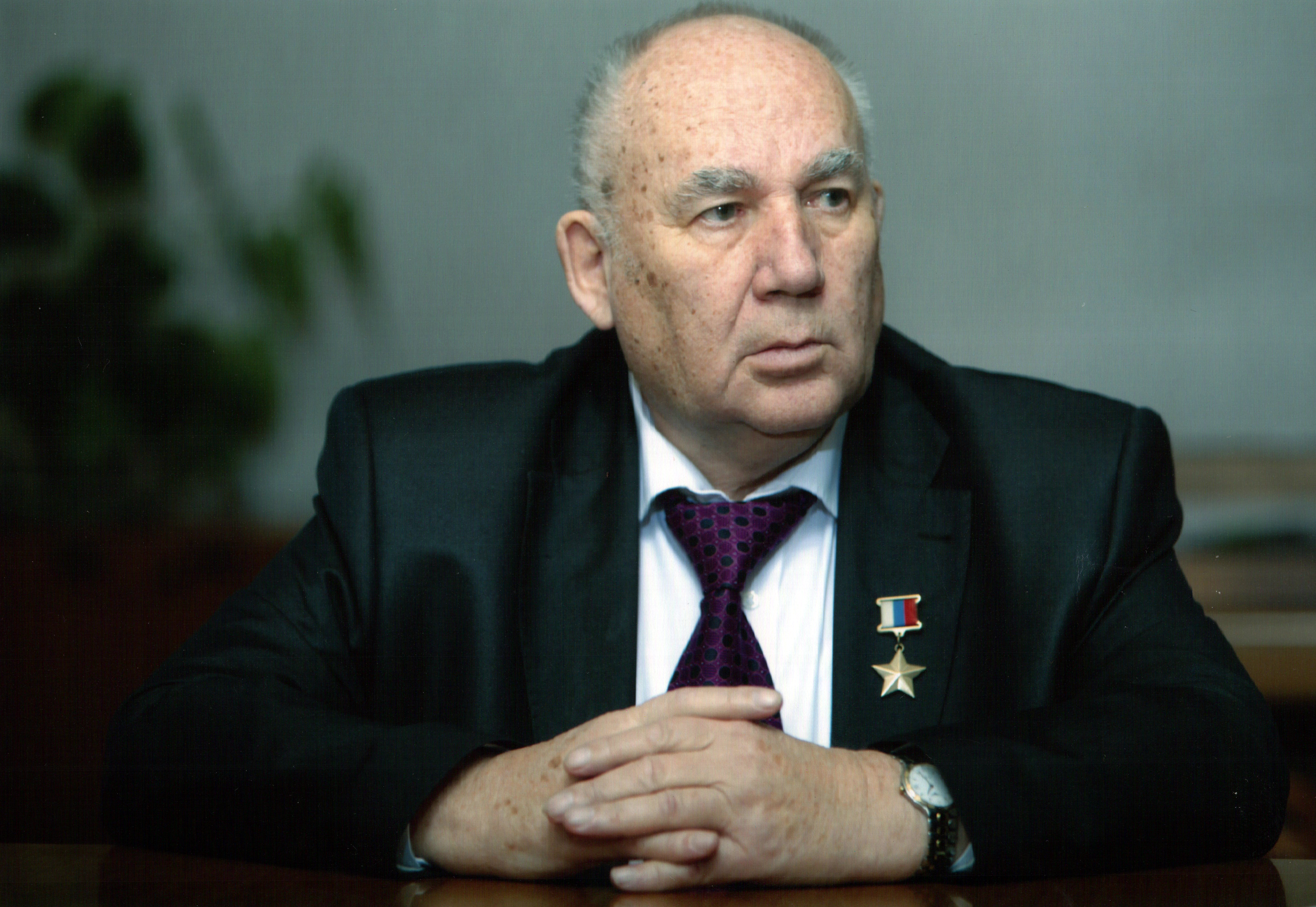 Герой России, конструктор, Почетный гражданин Тулы и Тульской области Макаровец Николай Александрович